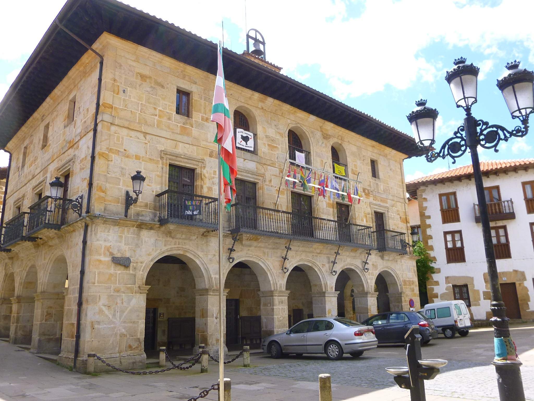 Ayuntamiento de Aramaio, en Ibarra (Álava)